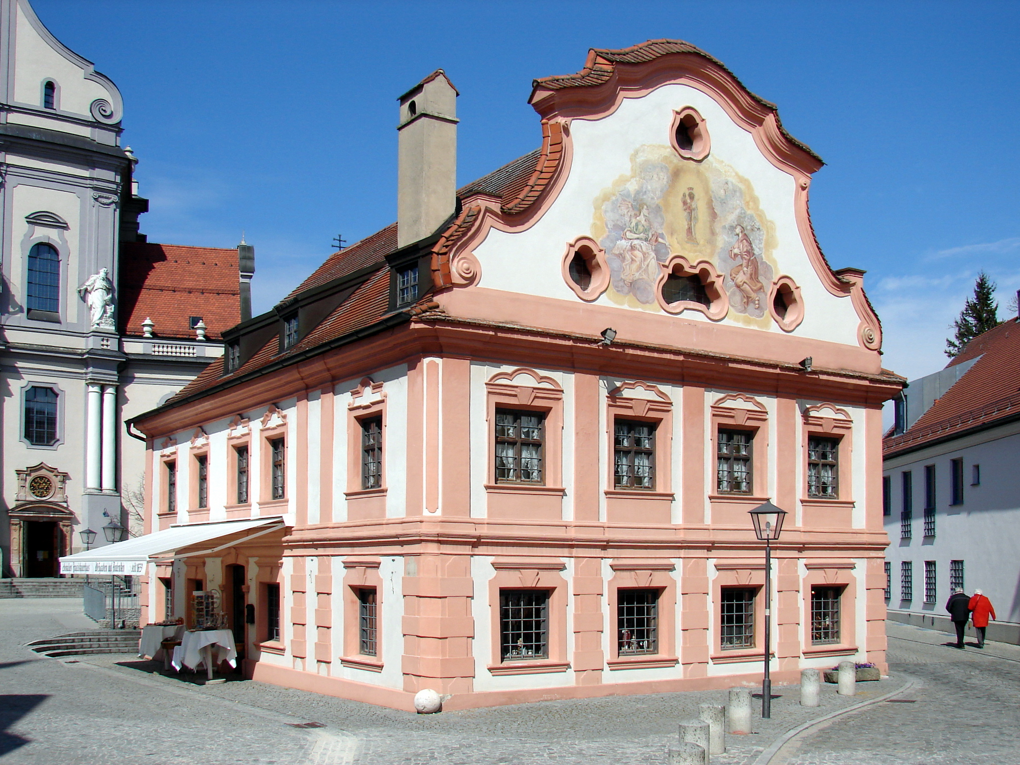 Ehemaliges Franziskanerhaus, sogenanntes Stielhaus am Bruder-Konrad-Platz 2 in Altötting, Landkreis Altötting, Regierungsbezirk Oberbayern, Bayern. Als Baudenkmal unter Aktennummer D-1-71-111-4 in der Bayerischen Denkmalliste aufgeführt. Laut Denkmalliste erbaut um 1745.